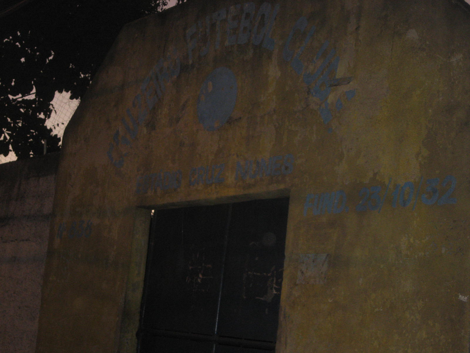 Fachada do estádio Cruz Nunes, do Cruzeiro FC, de Niterói.